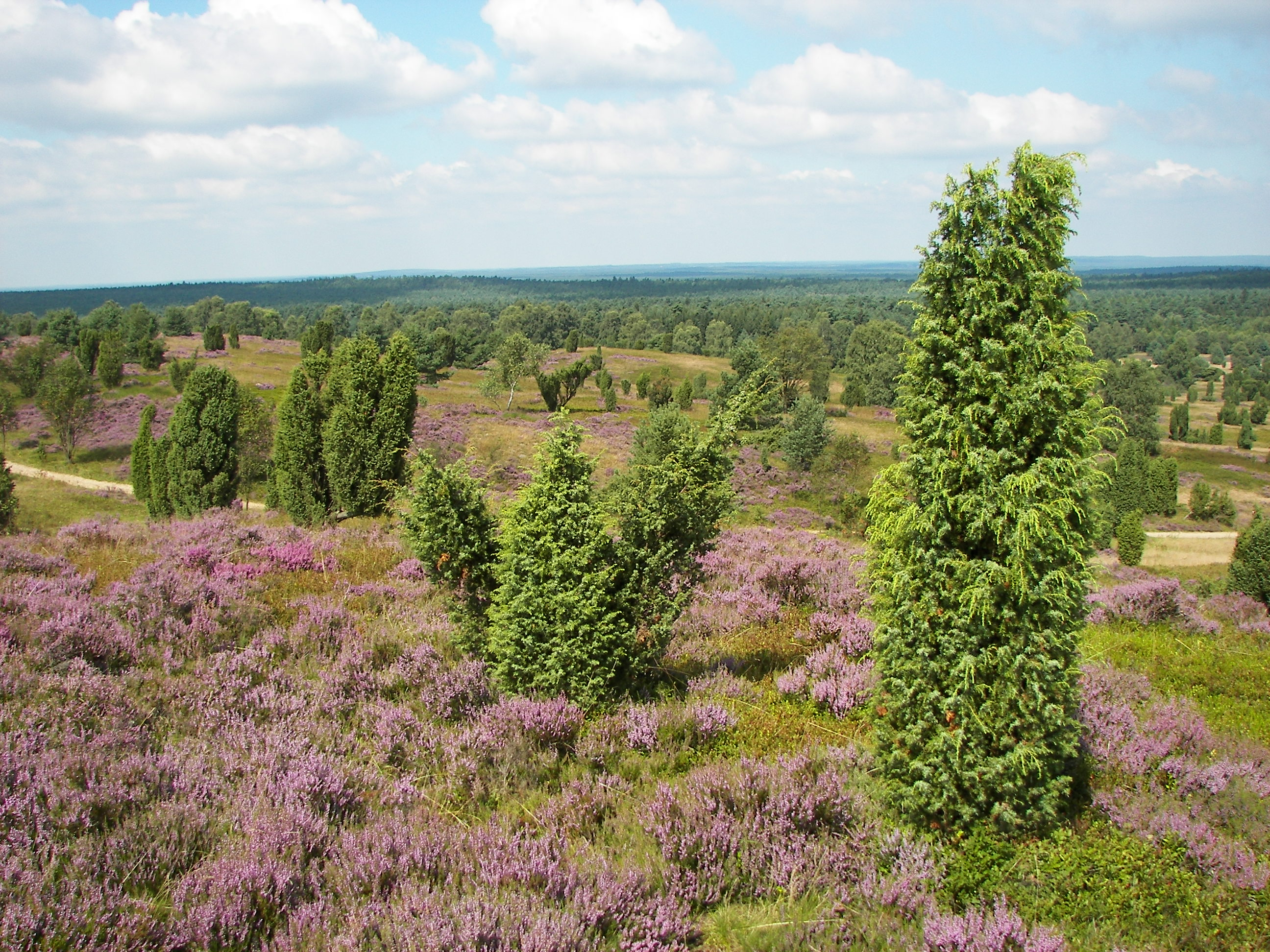 Blick vom Wilseder Berg